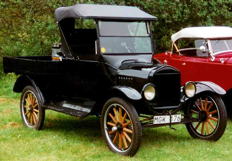 Ford Model T Pickup 1923